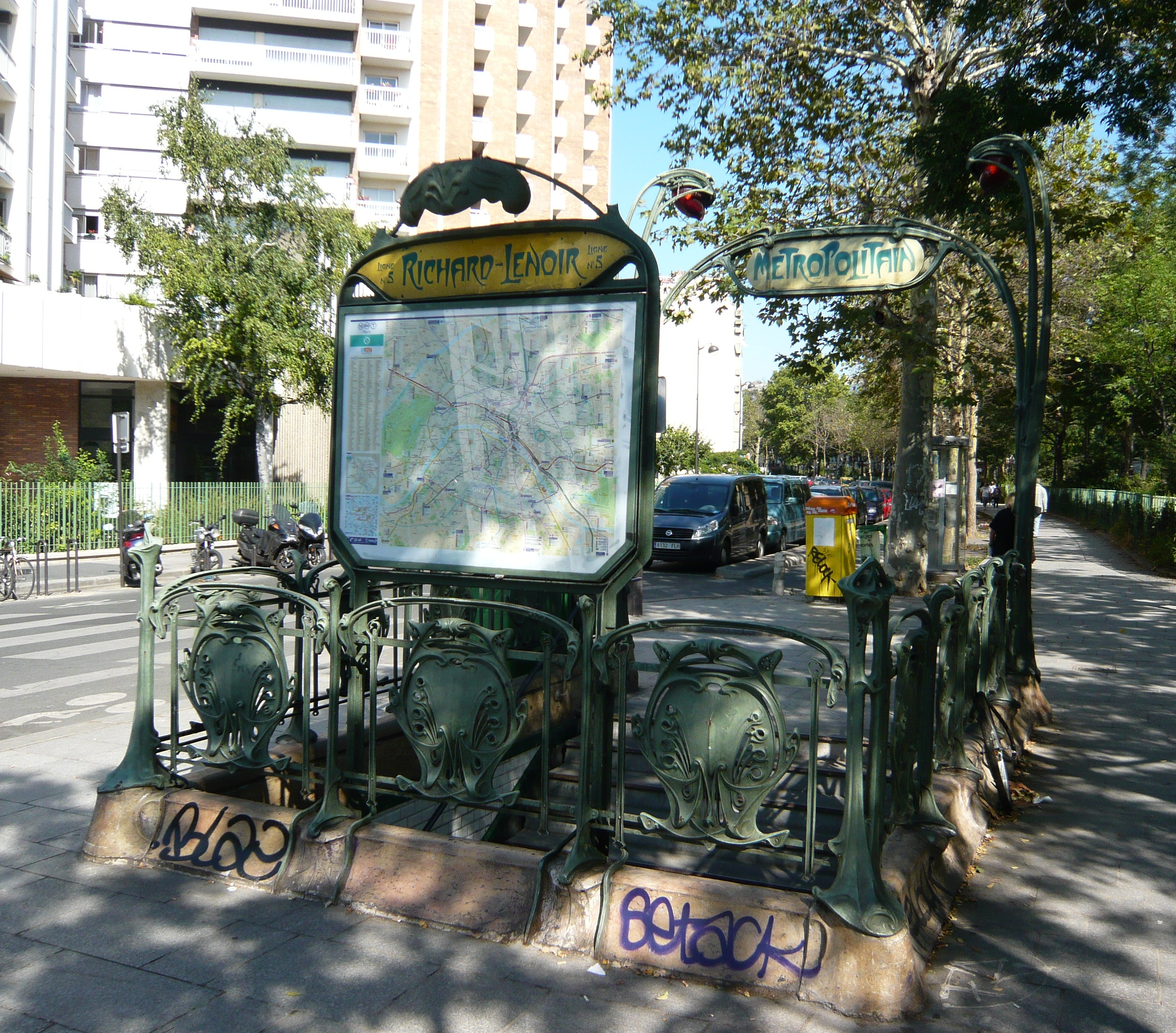 Edicule Guimard Métro Richard Lenoir